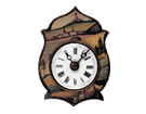 Eine Sorg-Uhr. Die Sorg-Uhr ist eine Kleinst-Wanduhr mit extrem kleinem Uhrwerk und einer Schildhöhe von ca. 7 cm. Die Uhr ist benannt nach der Uhrmacherfamilie Sorg, die um 1820 in Neustadt im Schwarzwald die ersten Uhren dieser Art fertigte. Originale sind unter Sammlern begehrt, weil äußerst selten.